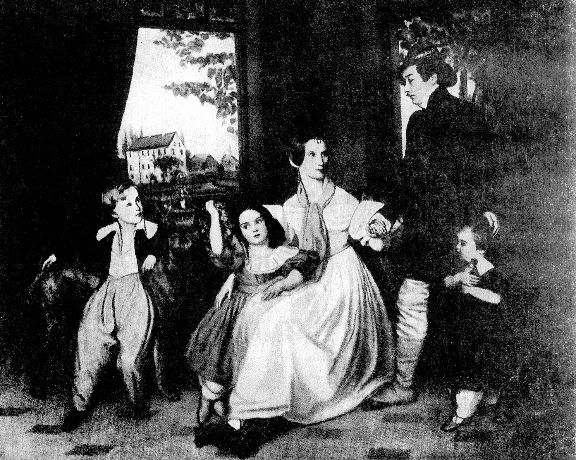 Die Familie Henoumont auf Haus Traar. Nach dem Gemälde von Joh. Wilh. Krafft, der um 1835 wiederholt als Gast der auf dem Bilde dargestellten Familie Carl Josef Henoumont und seiner Gattin Maria Anna von Daniels weilte. Der Krefelder Henoumontpark erhielt seinen Namen vom ersten Eigentümer des Hauses Traar nach der Säkularisation, Carl Josef Henoumont, der in seiner Wohnung vom Hofe aus meuchlings angeschossen wurde und 1816 an den Wunden strab. Sein gleichnamiger Neffe wurde sein Erbe (gest. 1869)